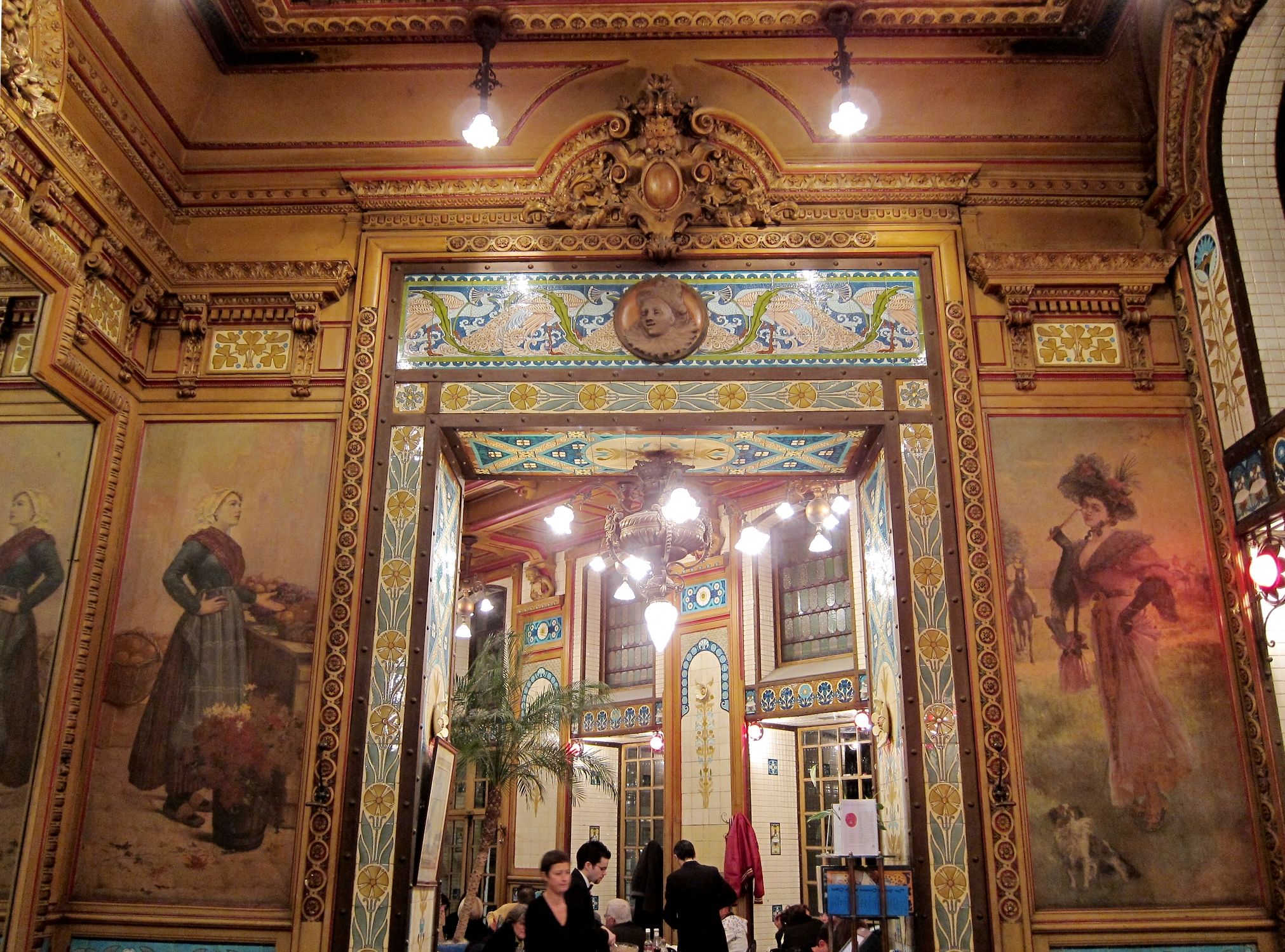 L'entrée du restaurant La Cigale à Nantes.